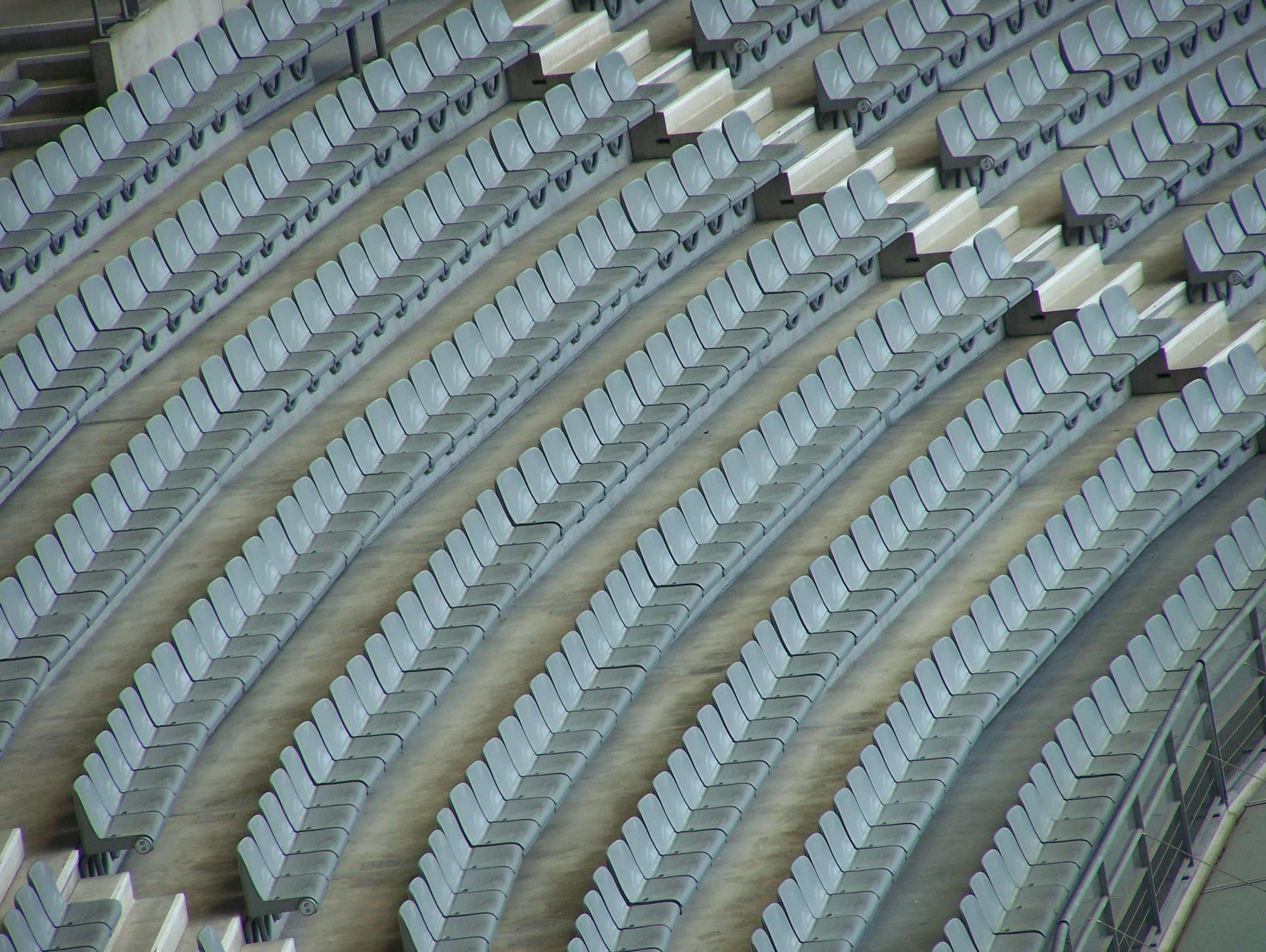 Stade de France